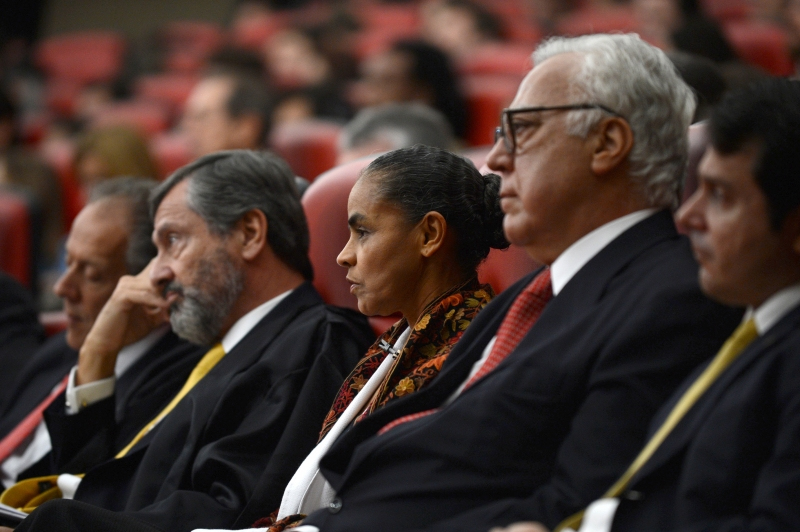 O Tribunal Superior Eleitoral (TSE) iniciou a sessão para decidir se concede registro ao partido Rede Sustentabilidade, fundado pela ex-senadora Marina Silva.